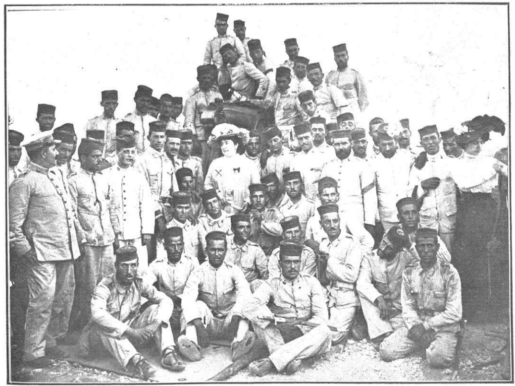 La distinguida escritora Carmen de Burgos (Colombine) (X) rodeada de oficiales y soldadosde artillería